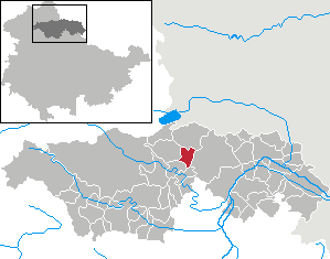 Rottleben in Thuringia - Kyffhäuserkreis